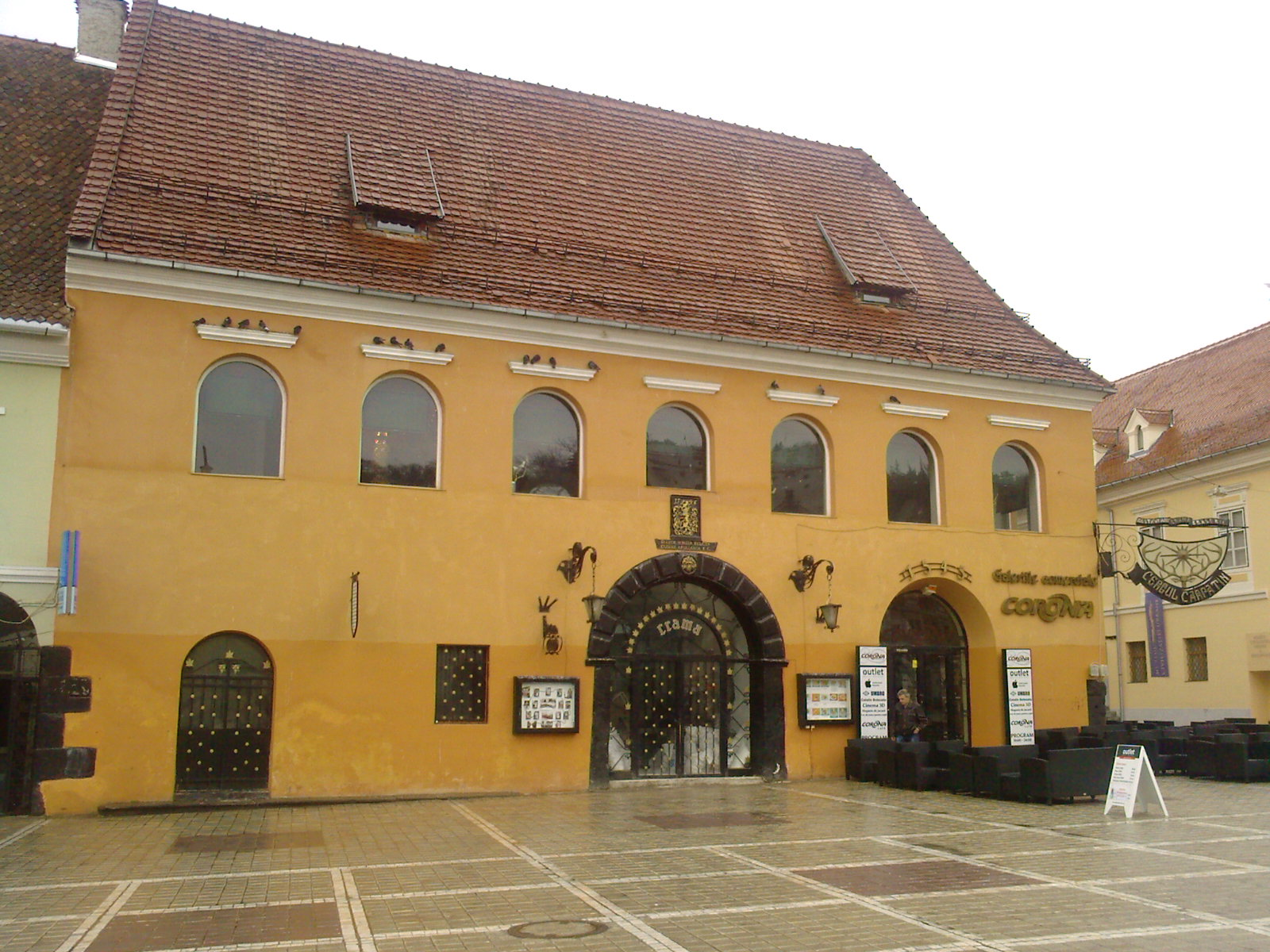 Monument de arhitectură din secolul al XVI-lea situat în Piaţa Sfatului din centrul vechi al Braşovului